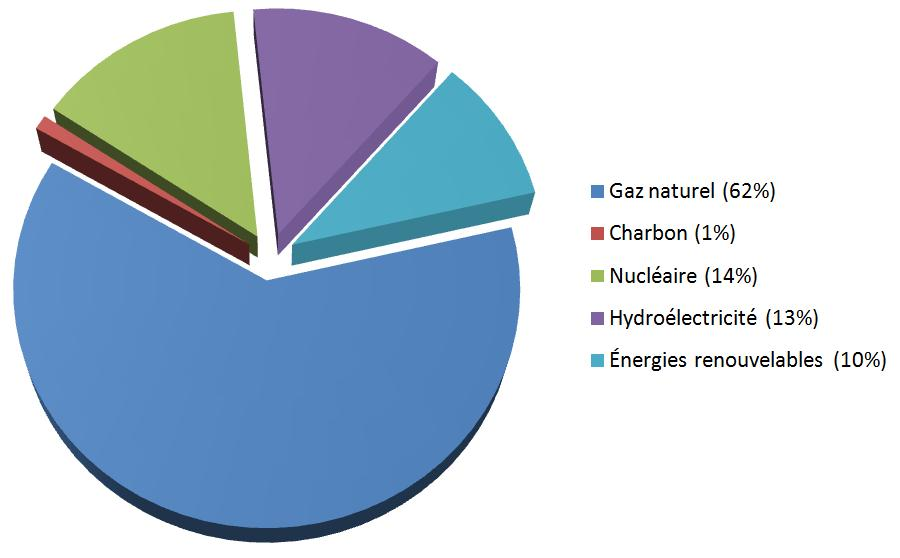 Diagramme Camembert sur les énergie de la Californie en 2007